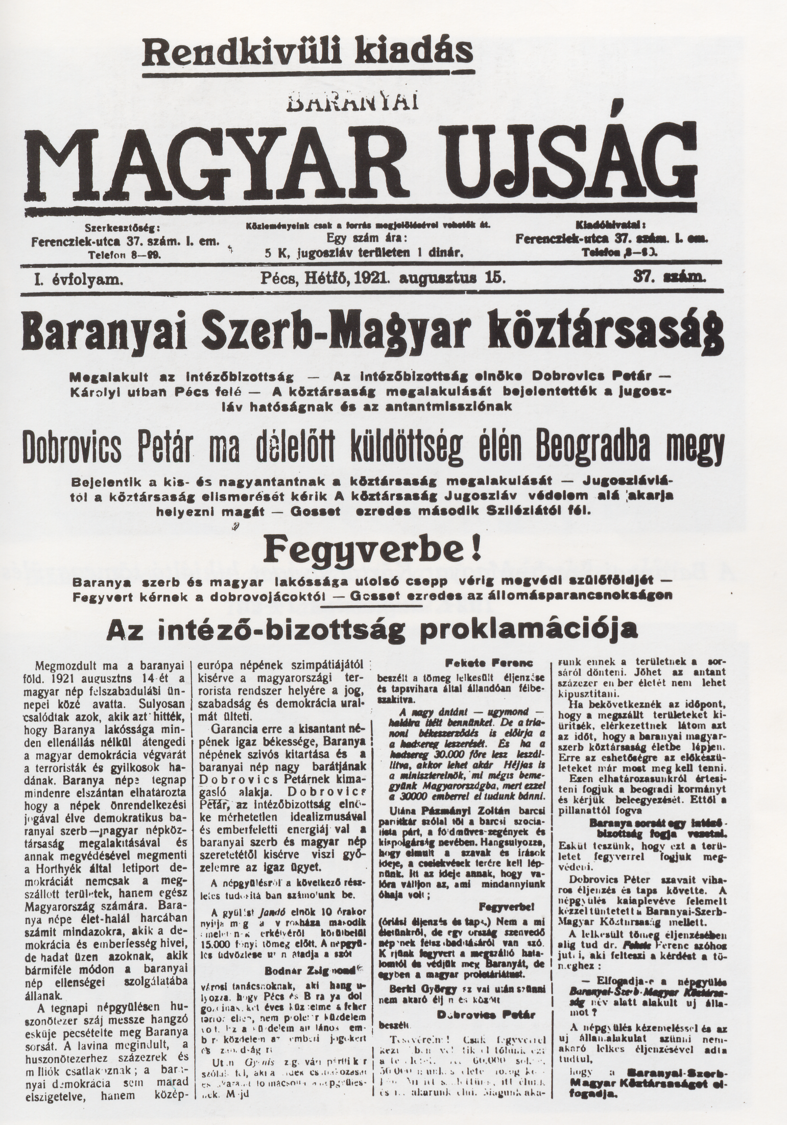 A Baranya-bajai Szerb-Magyar Köztársaság kikiáltása 1921-ben